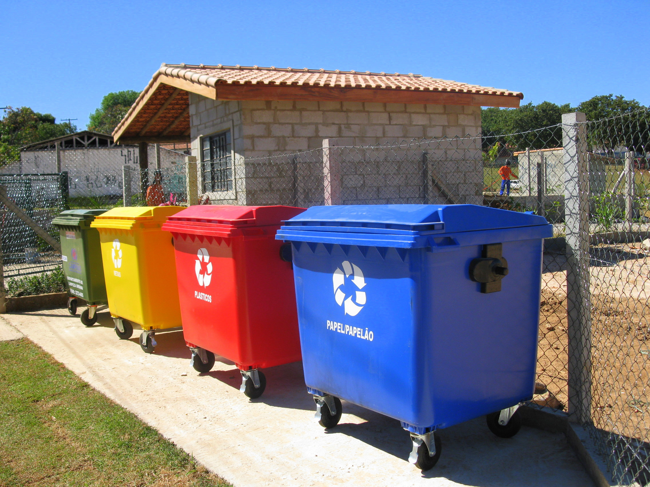 Ecoponto